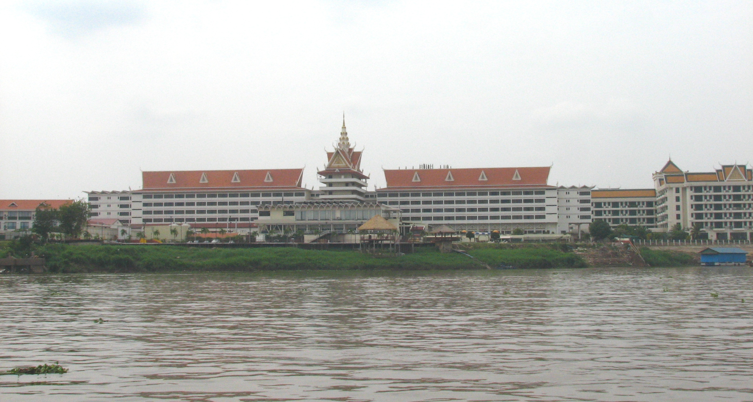 Building in Phnom Penh Cambodia מבנים בעיר פנום פן, מבט מנהר המקונג לעבר העיר, וכן מעגן הסירות של העיר דרכו נכנסים לעיר כל הבאים לעיר דרך הנהר מכוון ויטנאם